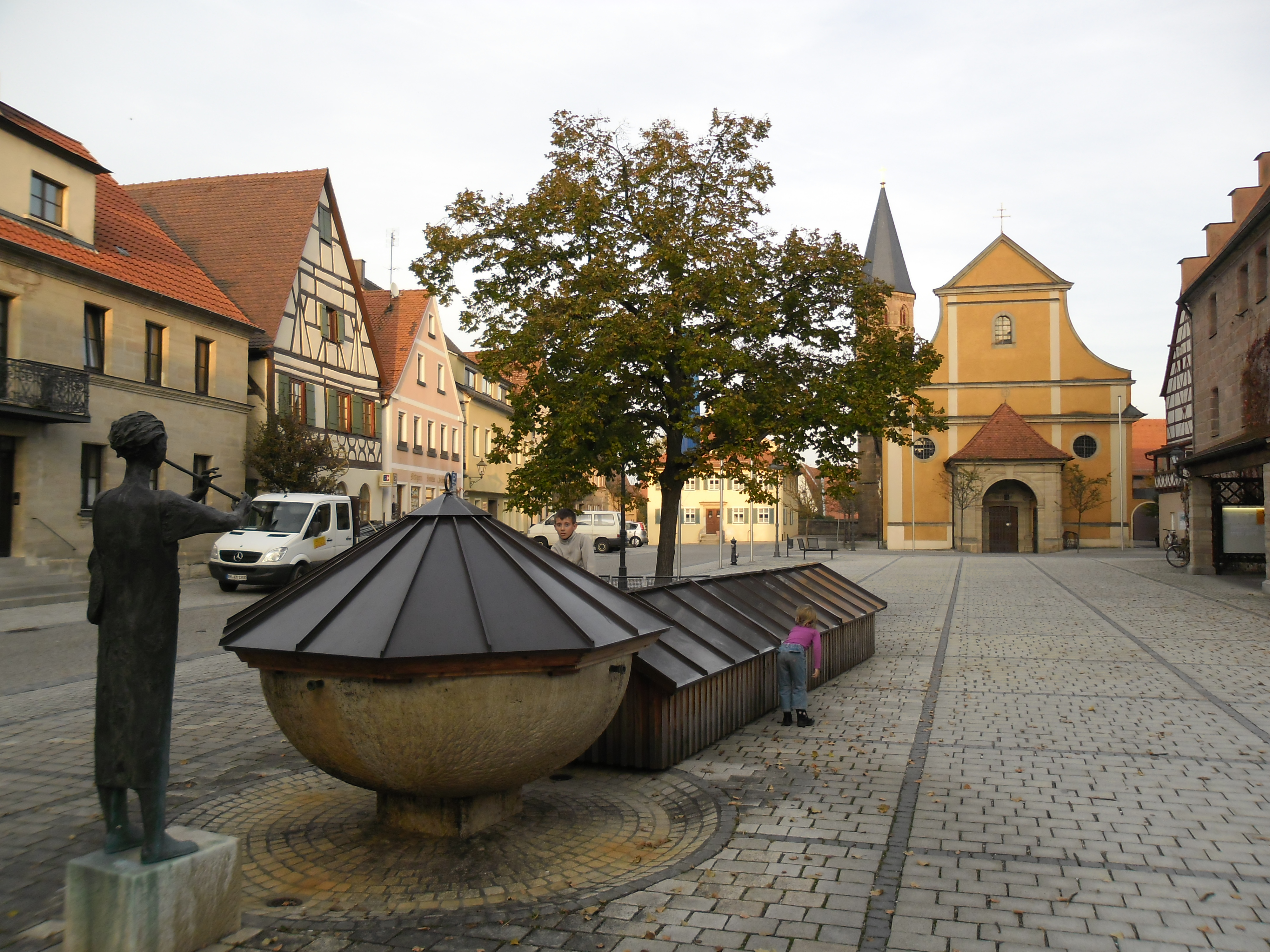 Blick in Richtung Osten auf den Marktplatz von Heideck